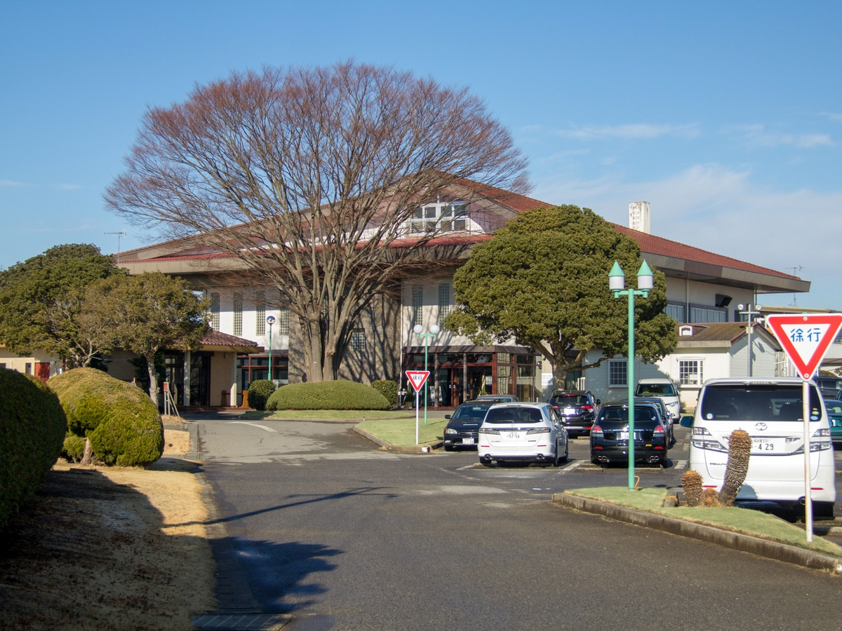 キャスコ花葉CLUB 空港コース